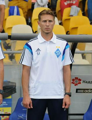 Сергій Федоров